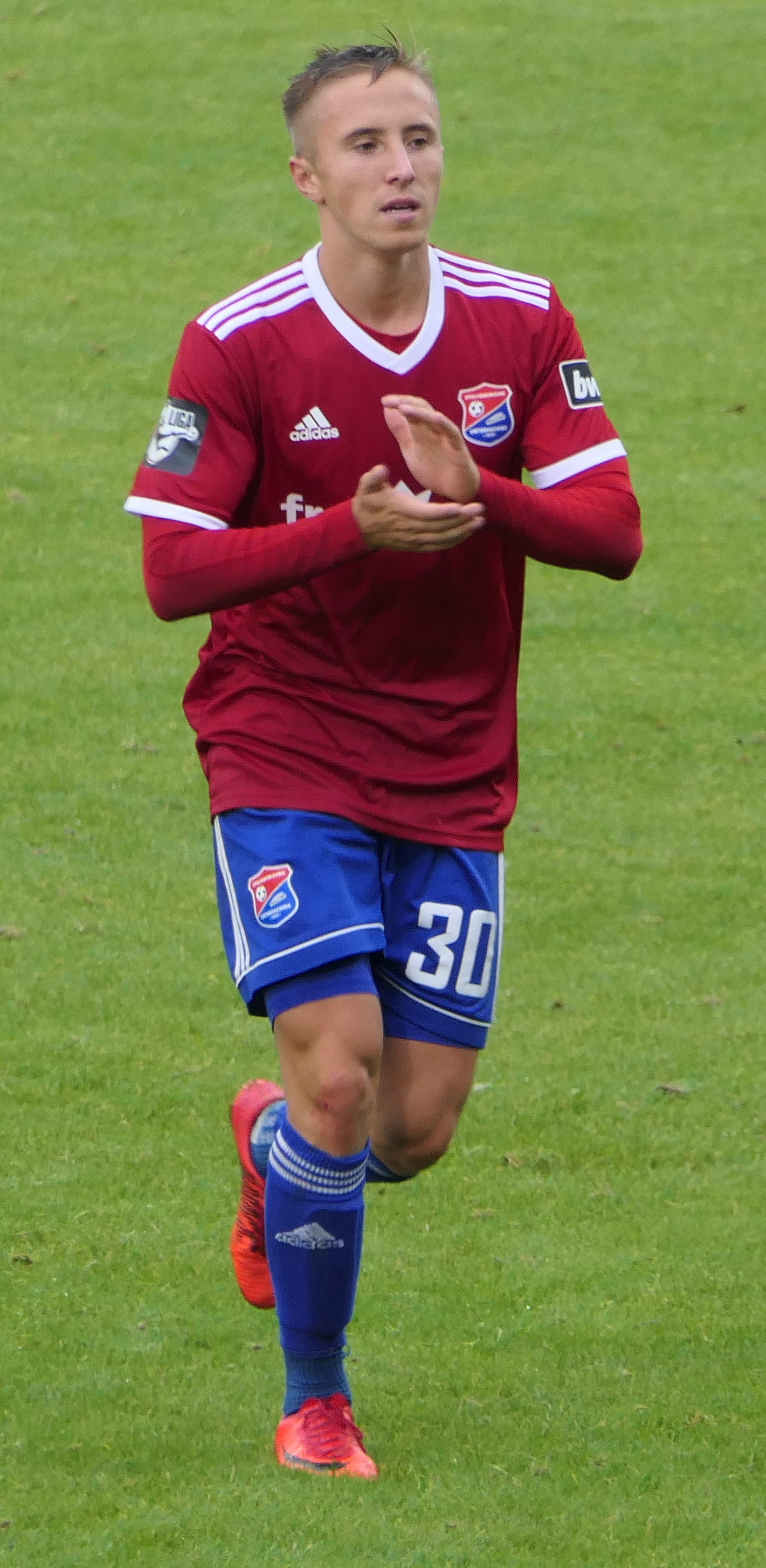 Der Fussballprofi Luca Marseiler im Trikot der SpVgg Unterhaching beim Heimspiel gegen Eintracht Braunschweig am 01.09.2018.